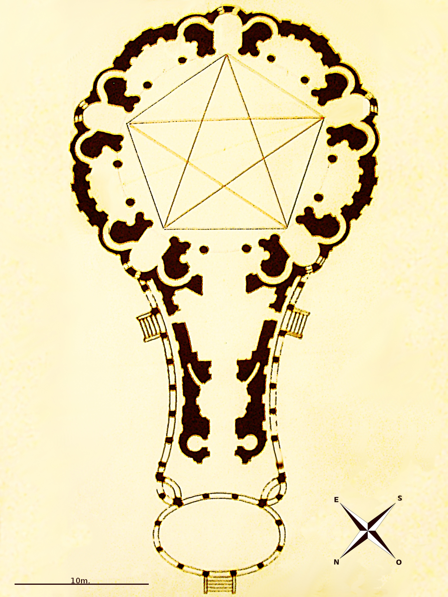 Plan de l'église St-Didier d'Asfeld dans les Ardennes en France